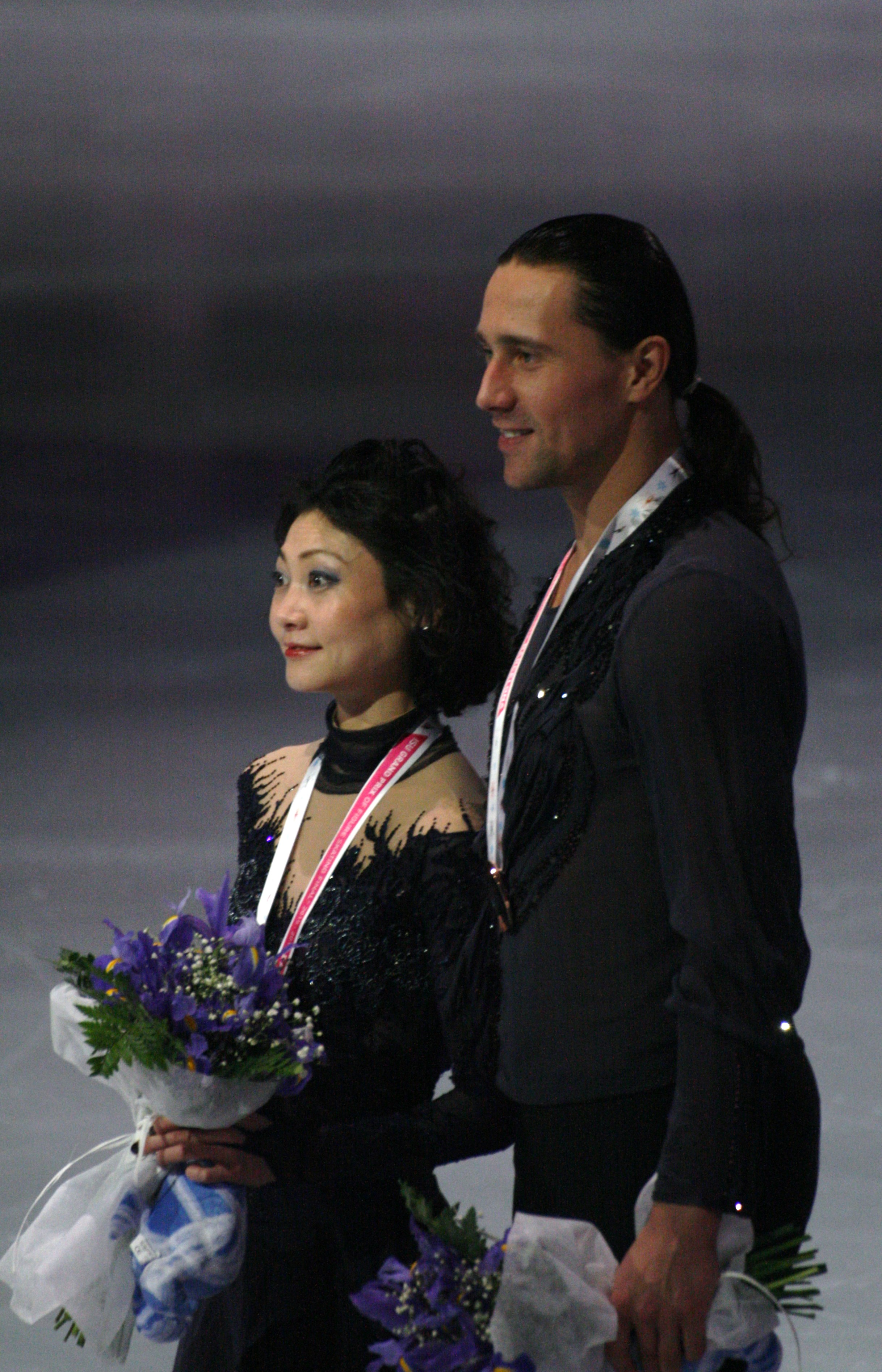 Юко Кавагути и Александр Смирнов (Россия) на церемонии наградения в финале Гран-при по фигурному катанию 2015-2016.